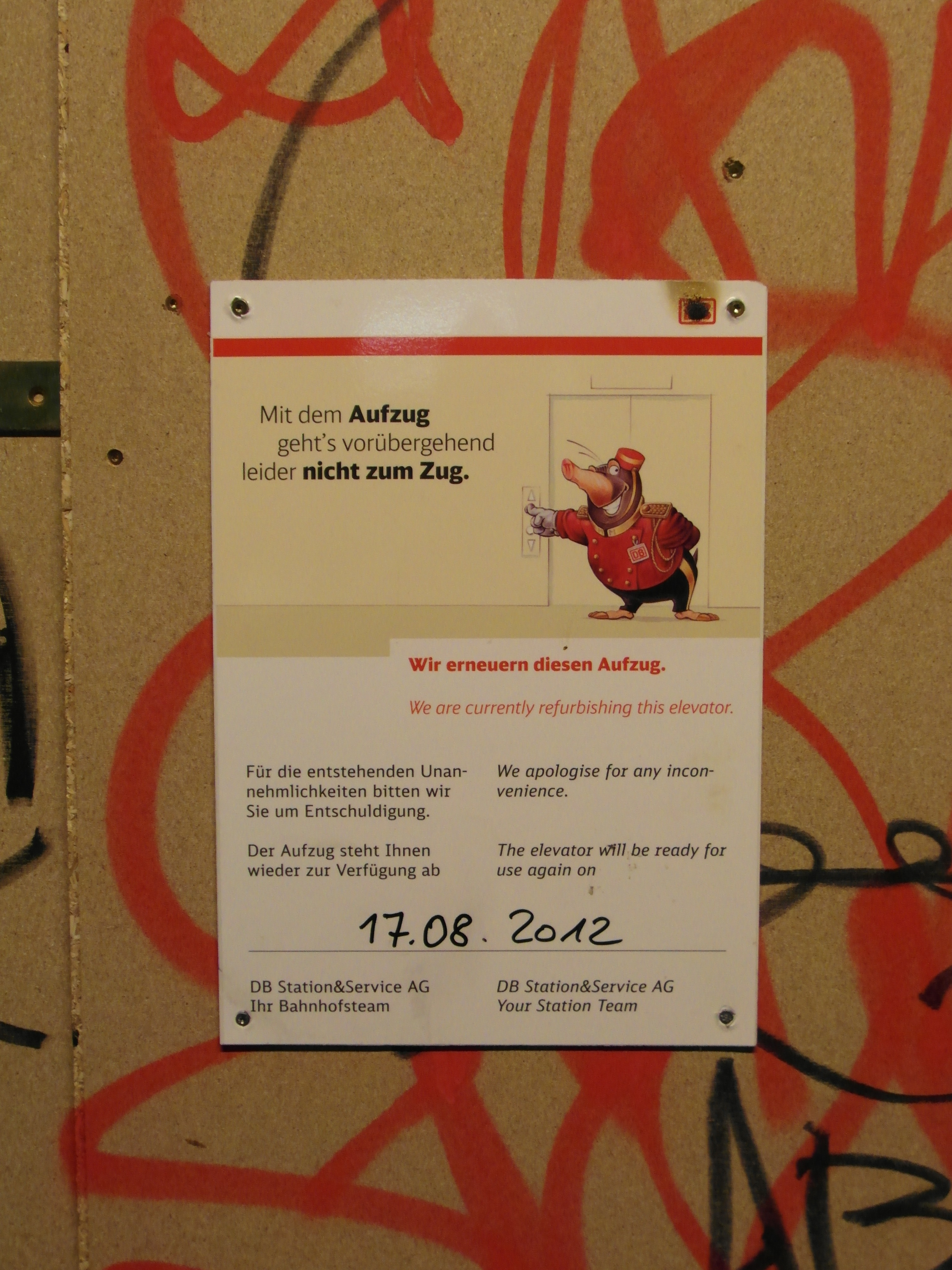 Ringbahn - Linien S41, S42, S8 - zur Zeit auch S9 und vielleicht auch mal wieder S85